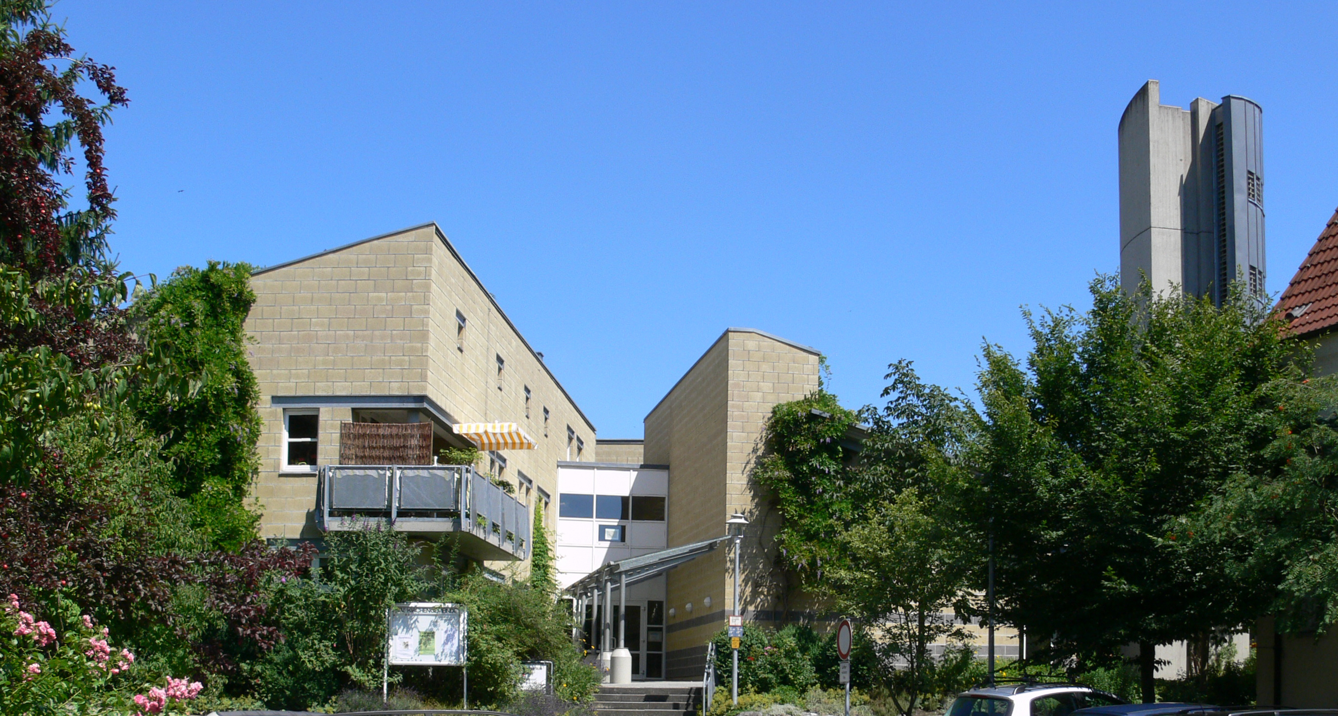 Ravensburg, Ortschaft Eschach: Evangelisches Lukas-Gemeindezentrum Oberhofen